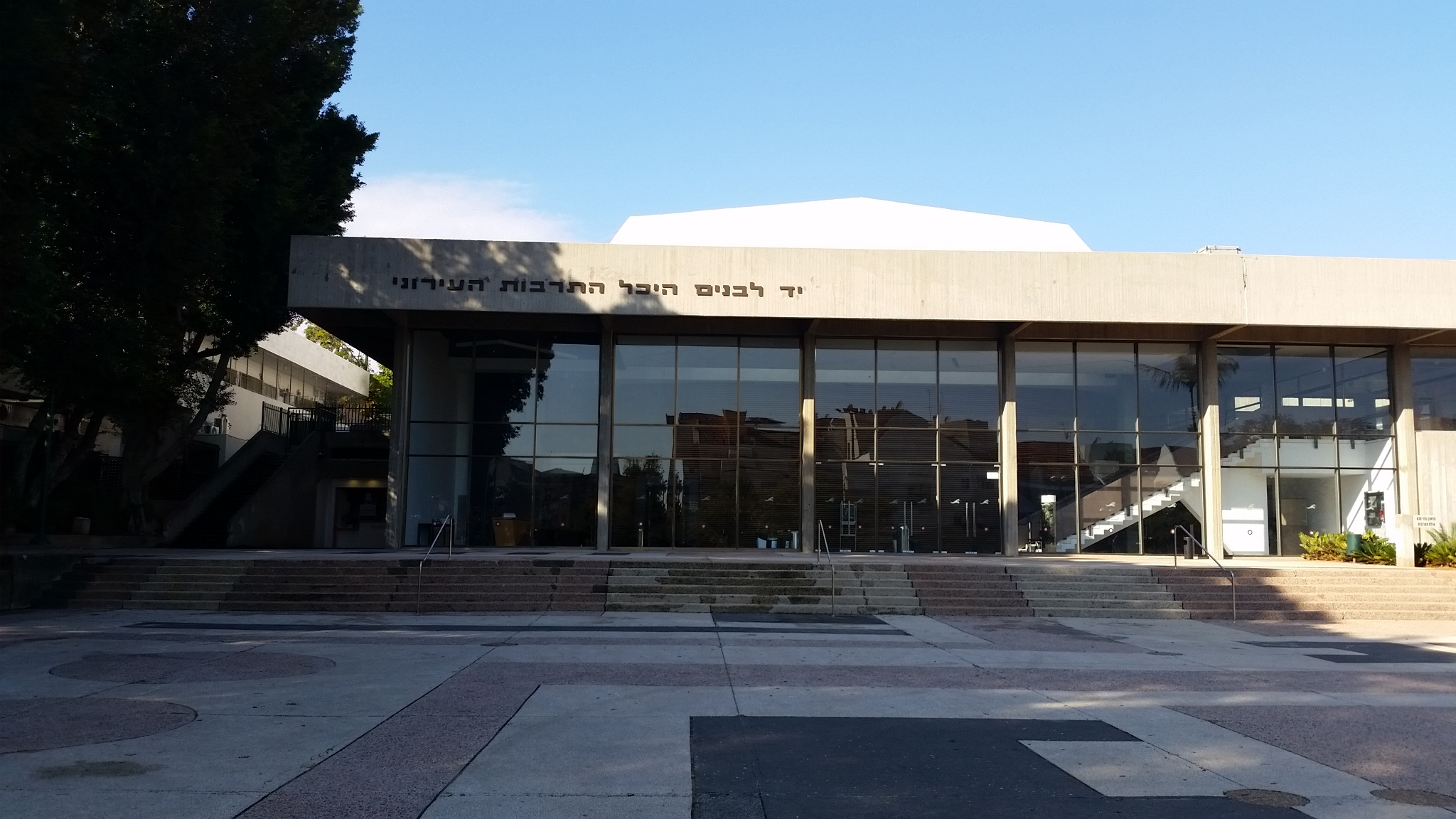 צילום